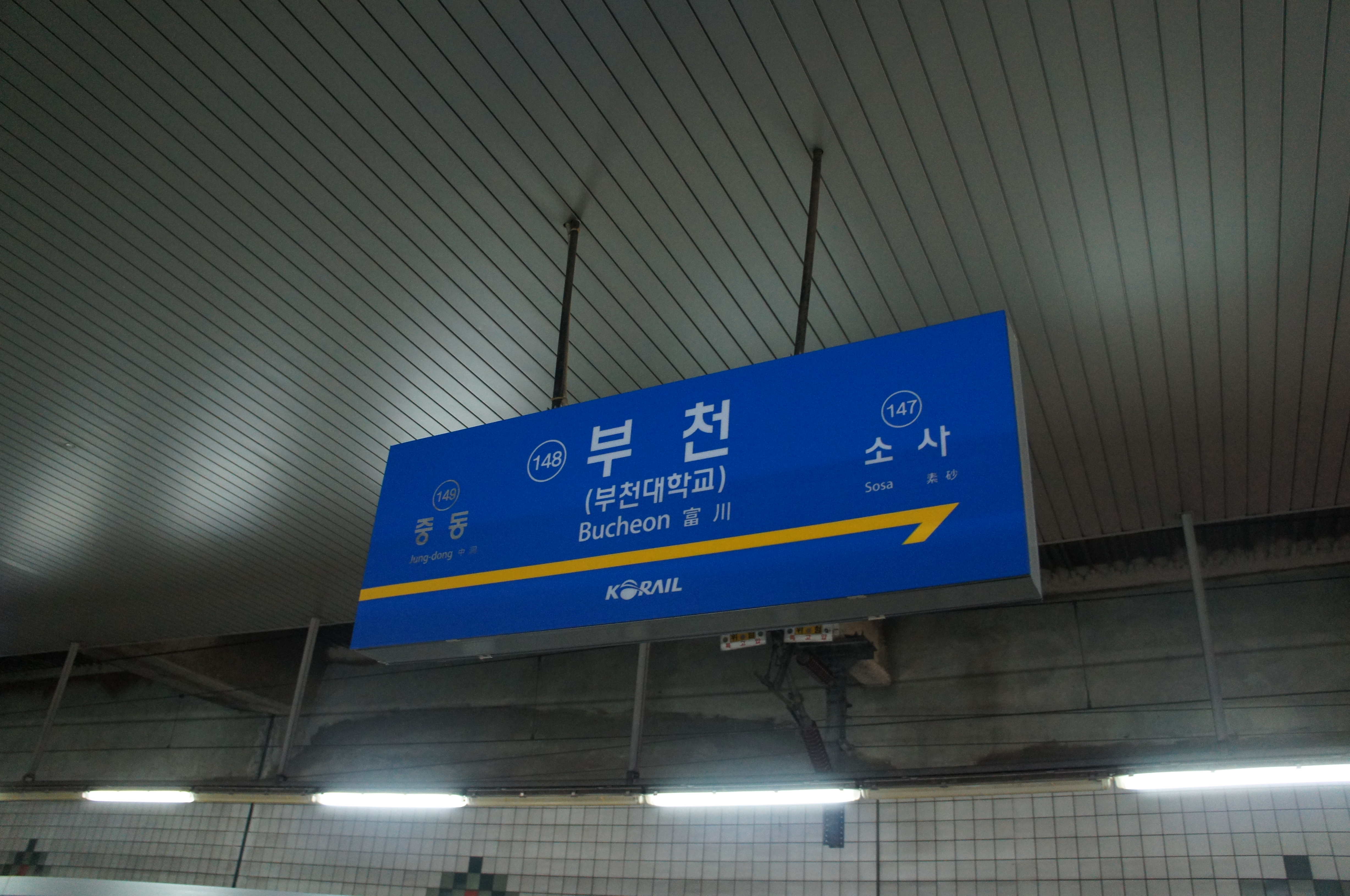 부천역 역명판